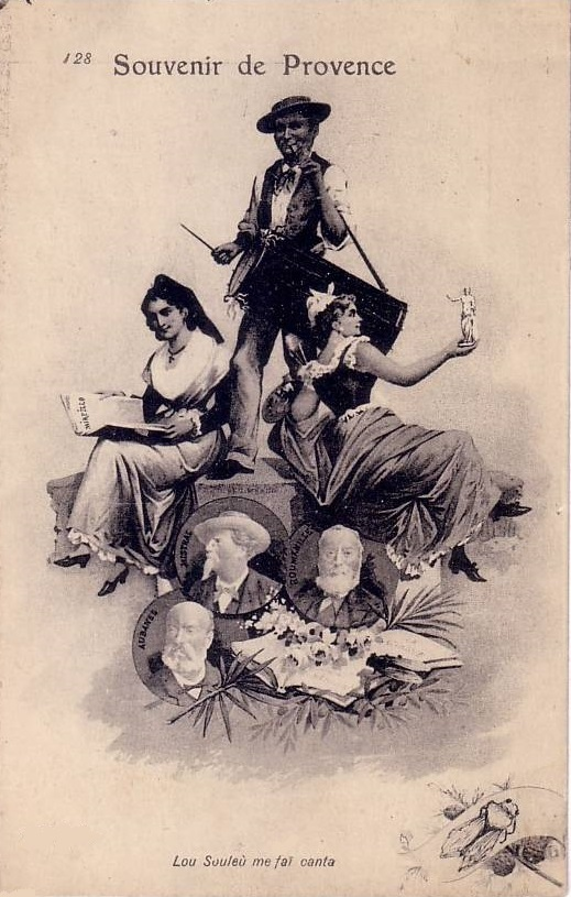 Tambourinaire et le felibrige